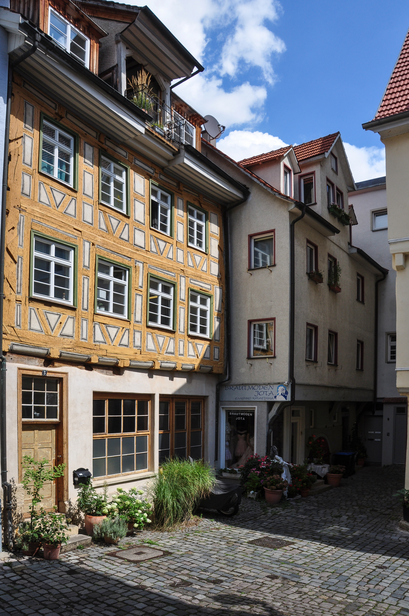 Hier wird die ganze mittelalterliche Enge deutlich sichtbar. Links im Vordergrund das Gebäude 5, von dem nur der Gewölbekeller unter Denkmalschutz steht, dahinter die Nr. 7 mit Denkmalschutz, ganz im Eck kaum zu erkennen, der Eingang zu Gebäude Nr. 9. Ganz rechts das angeschnittene Gebäude ist die Nr. 11.